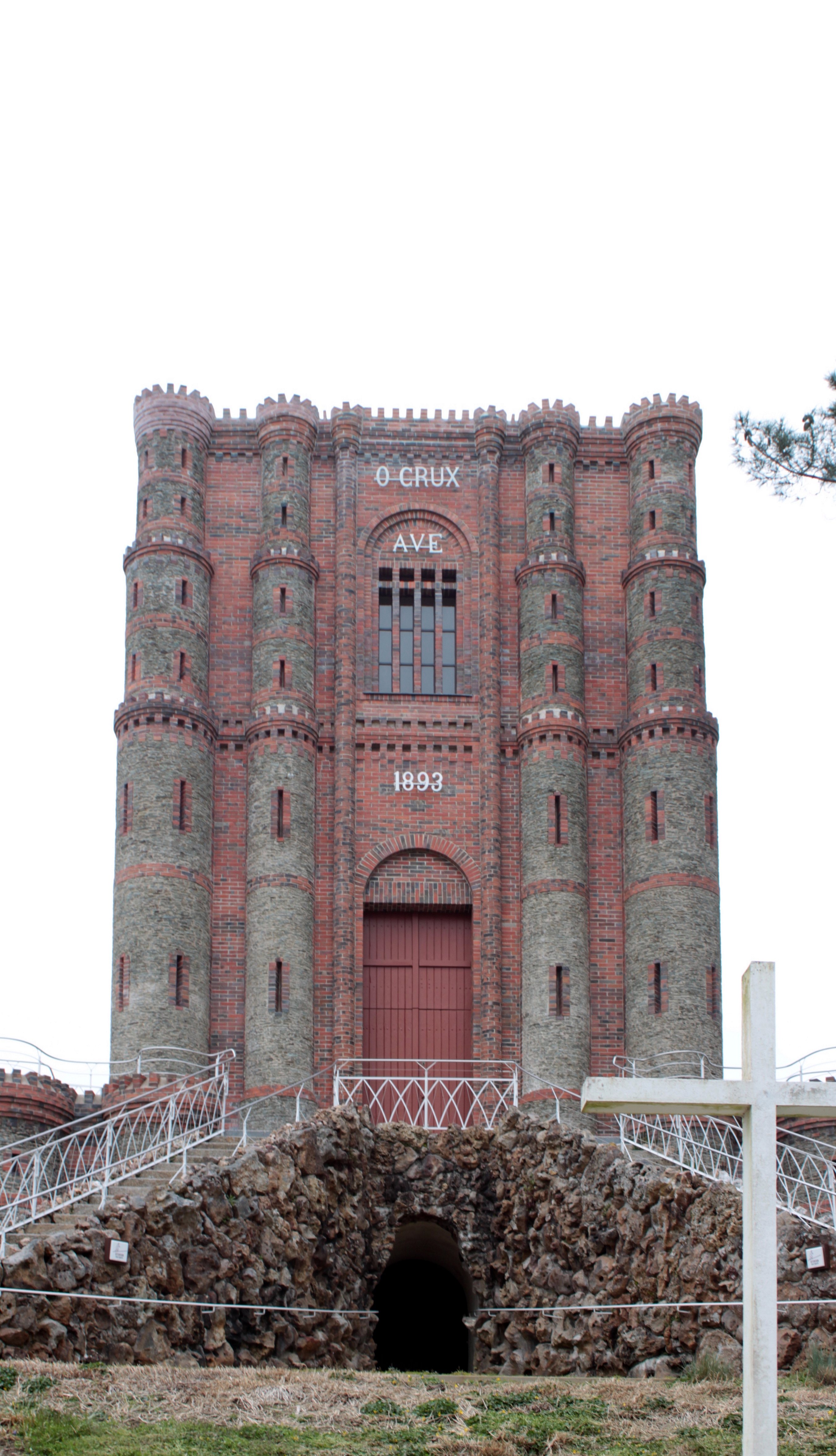 Sanctuaire de la Salette, 1886, Fr-85-La Rabatelière.